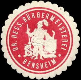 Sealing stamp Title: Gr. Hess. Bürgermeisterei Bensheim Description: rot, weiß, geprägt Place: Bensheim size: 4 cm